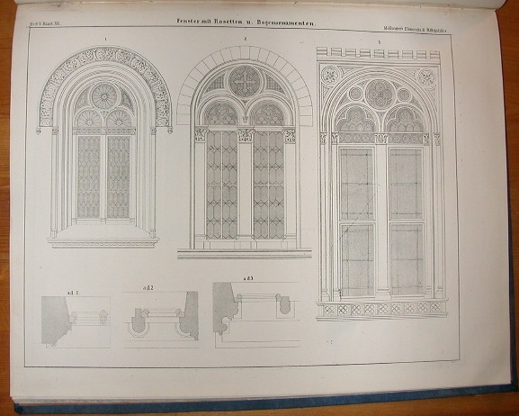 neoromanische Fenstergewände, entworfen von Karl Möllinger